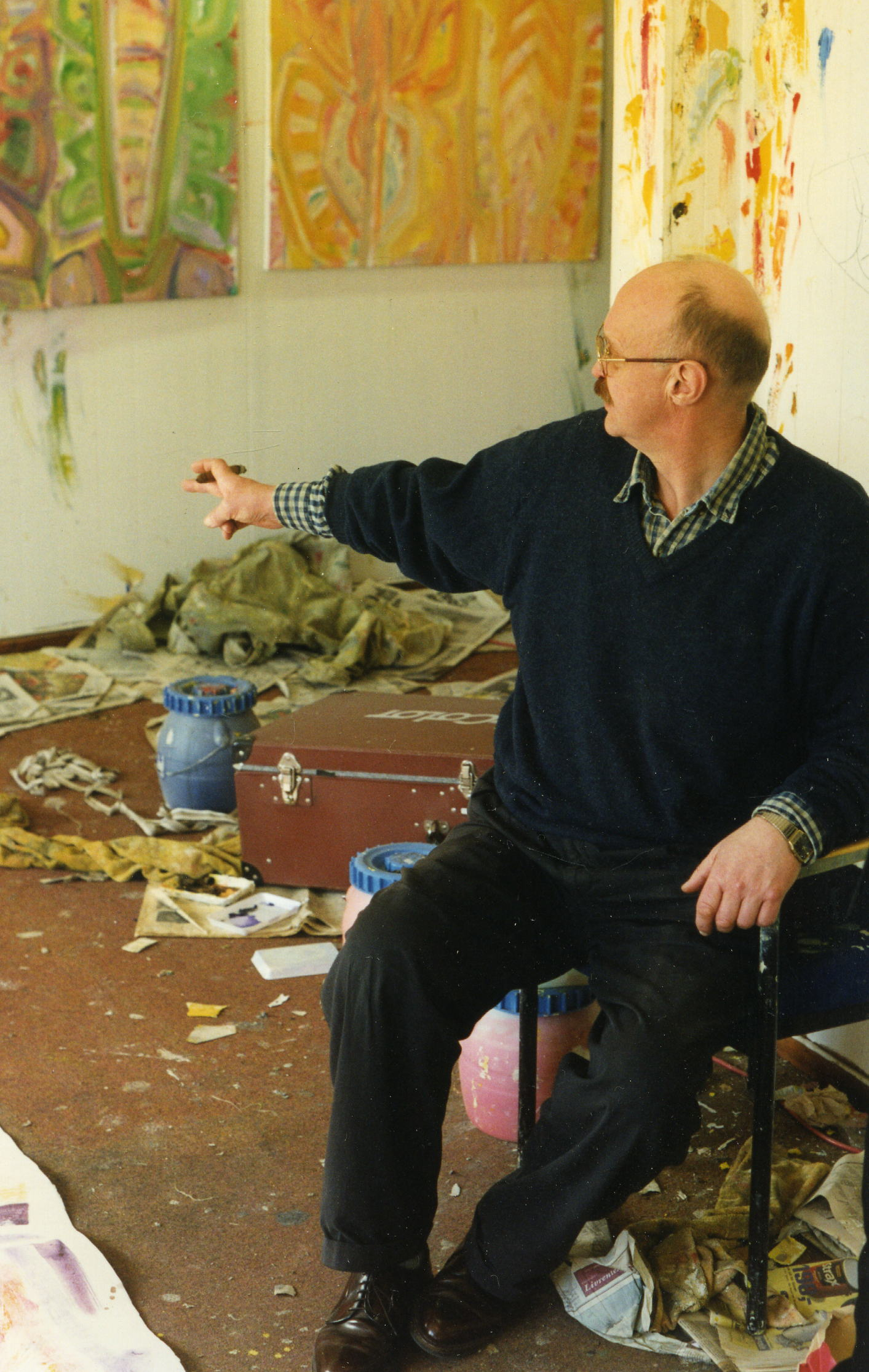 Le peintre norvégien Kjell Pahr-Iversen